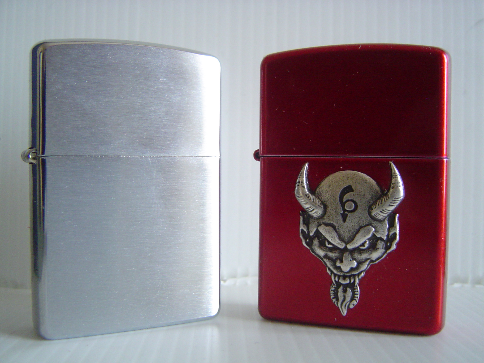 Zippo Chiusi